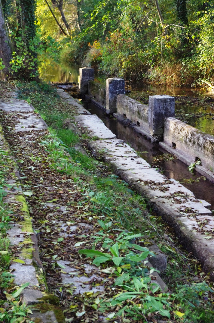 Lavoir en bordure du Steinbaechlein (burnhaupt-le-bas, haut-rhin, france)